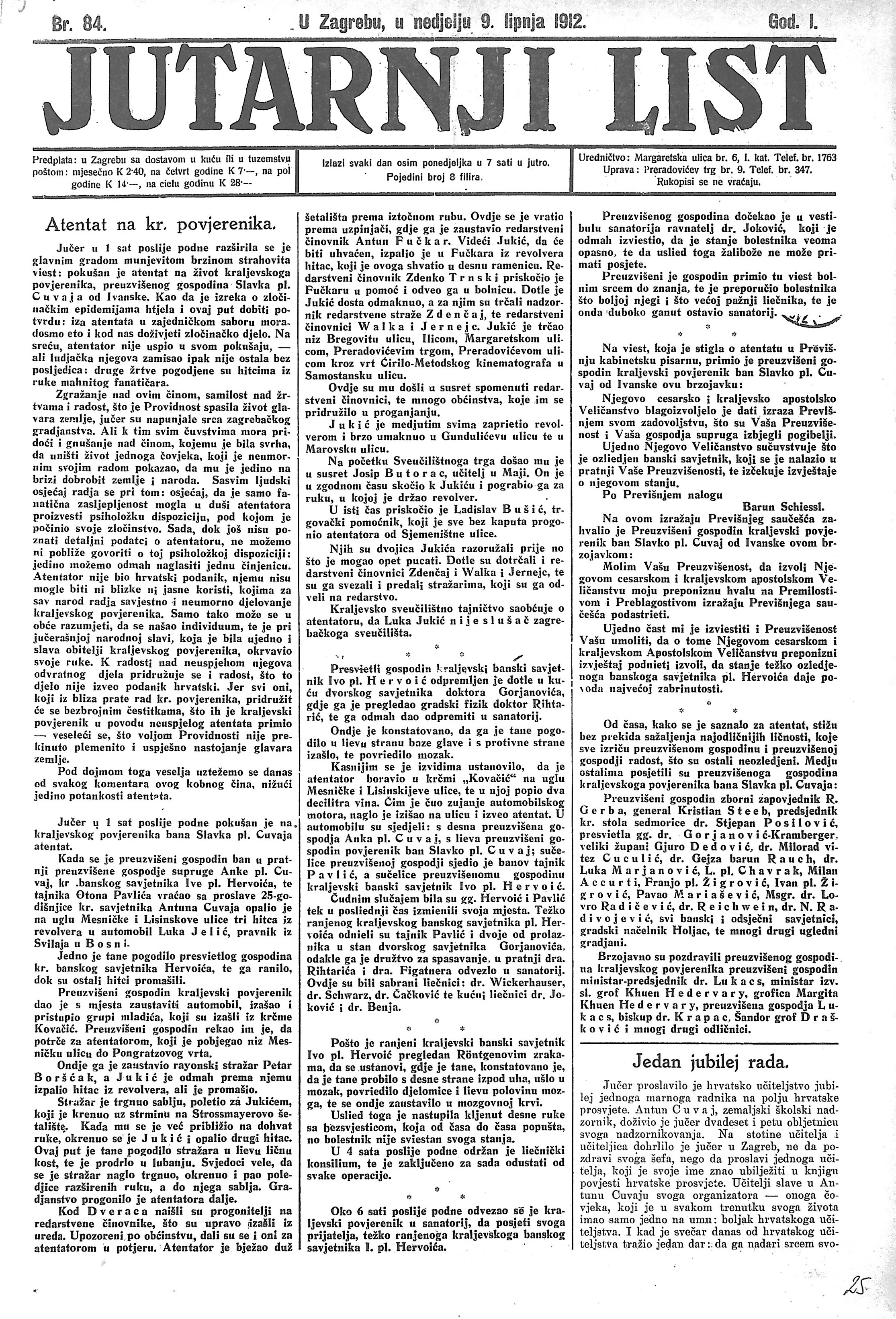 Srpskohrvatski / српскохрватски: Jutarnji list o neuspješnom atentatu na komesara Hrvatske, bana Slavka Cuvaja 1912. godine.